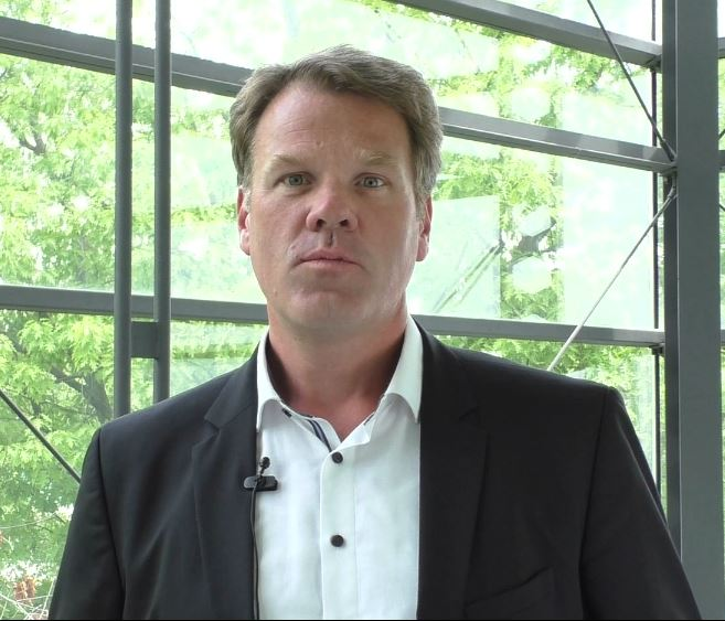 Vorstellung Prof. Ehlers für die Lehre an der DHBW